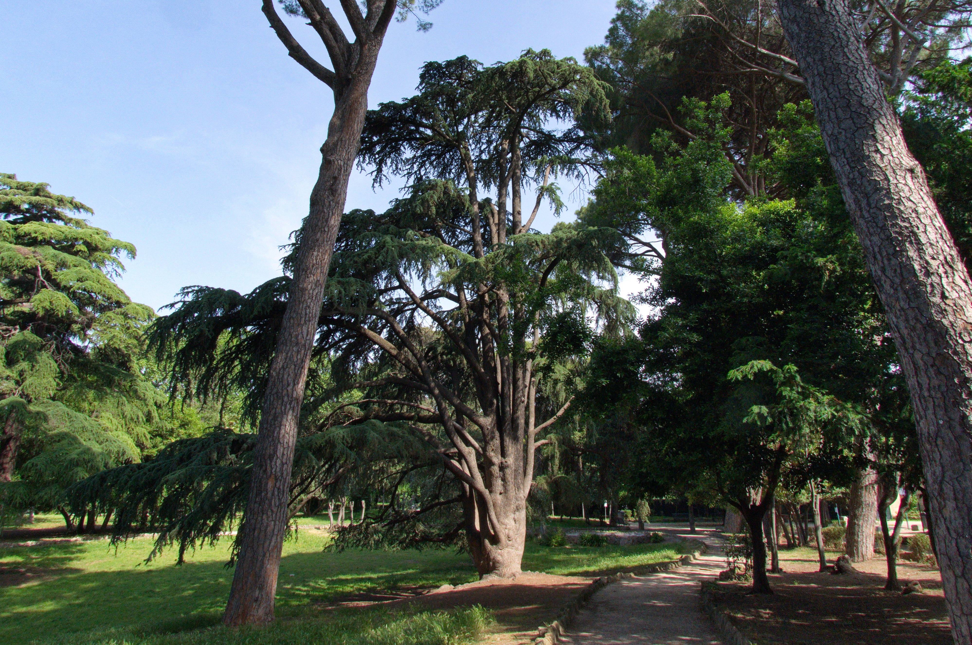 cedro del Libano - Albero monumentale - Villa Celimontana - Roma This is a photo of a monument which is part of cultural heritage of Italy.